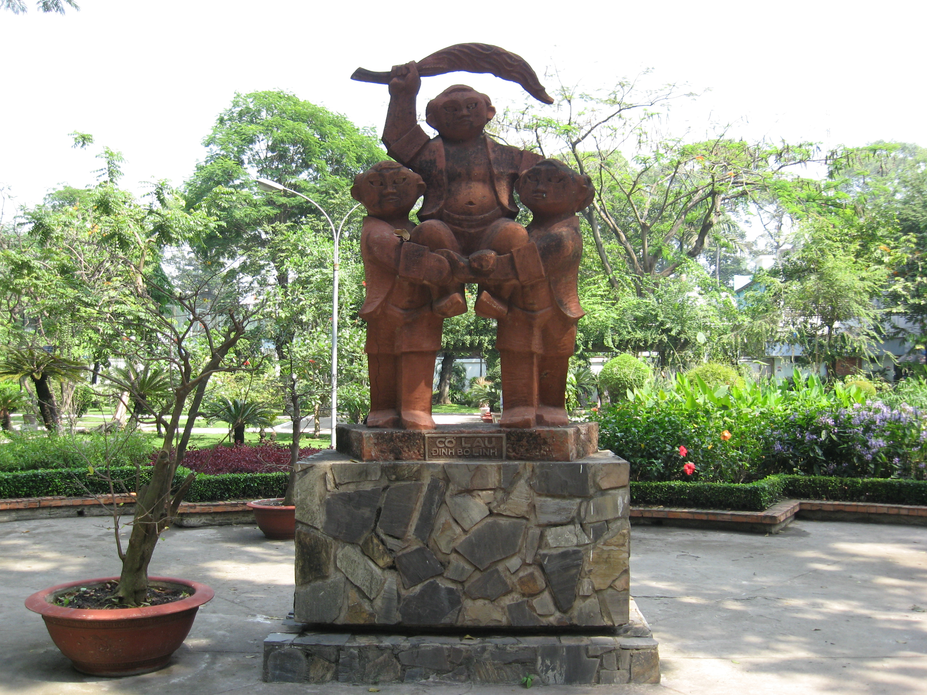 Tượng đài Cờ lau Đinh Bộ Lĩnh ở Công viên Tao Đàn TP HCM